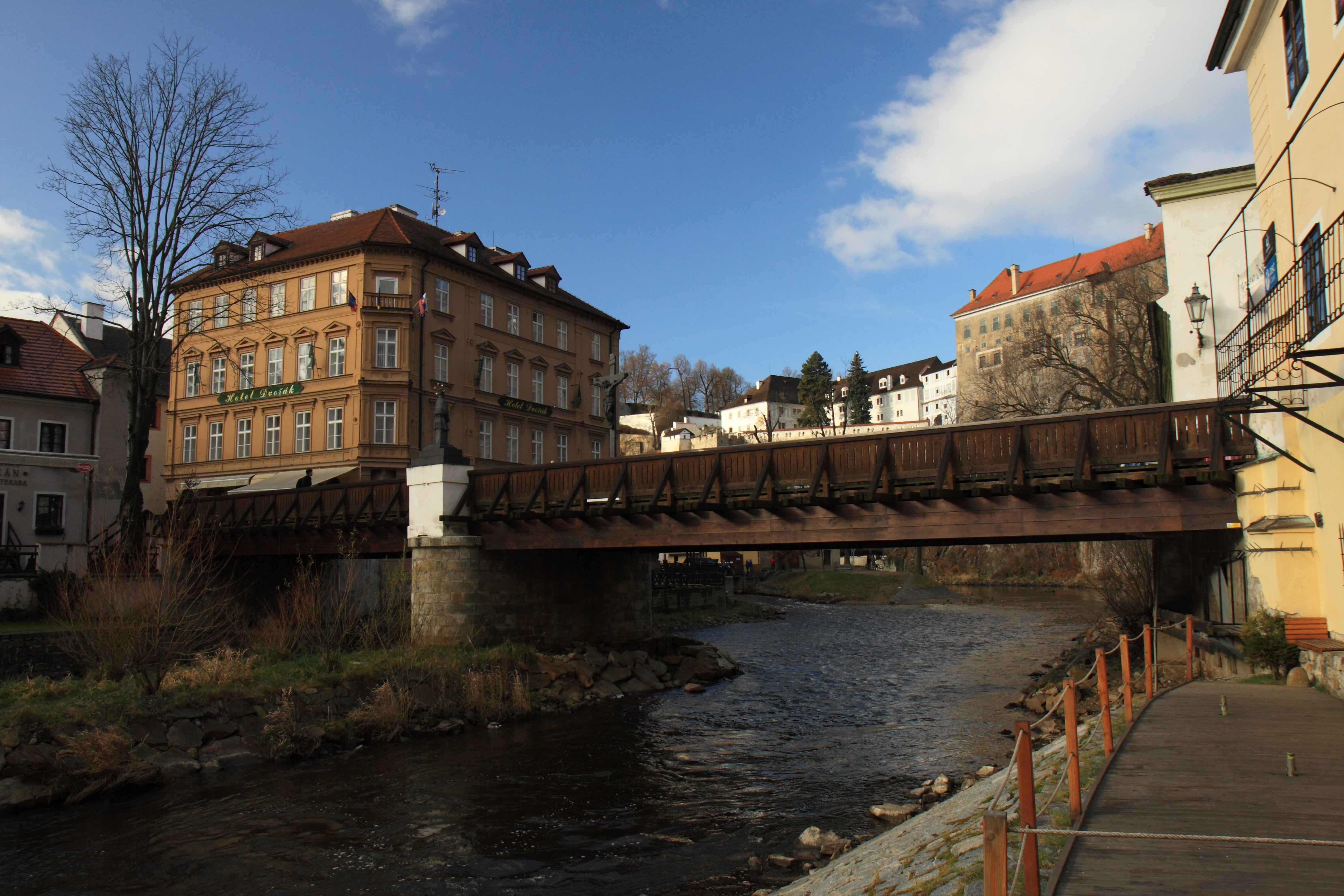 Lazebnický most v Českém Krumlově